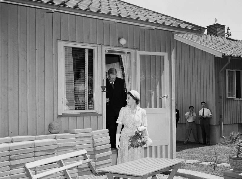 Anundsvägen 49. Engelska drottningen Elizabeth II och kung Gustaf VI Adolf besöker familjen Larsson i en småstuga i Norra Ängby